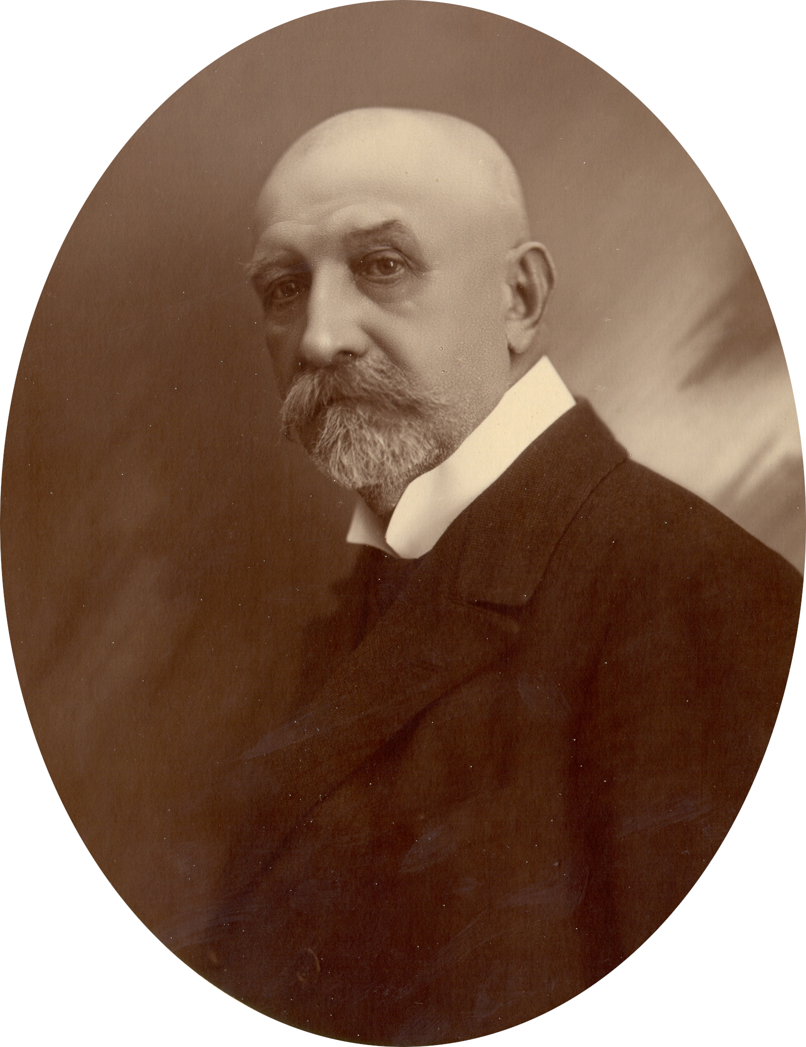 Matko Mandić (1849-1915), Croatian politician